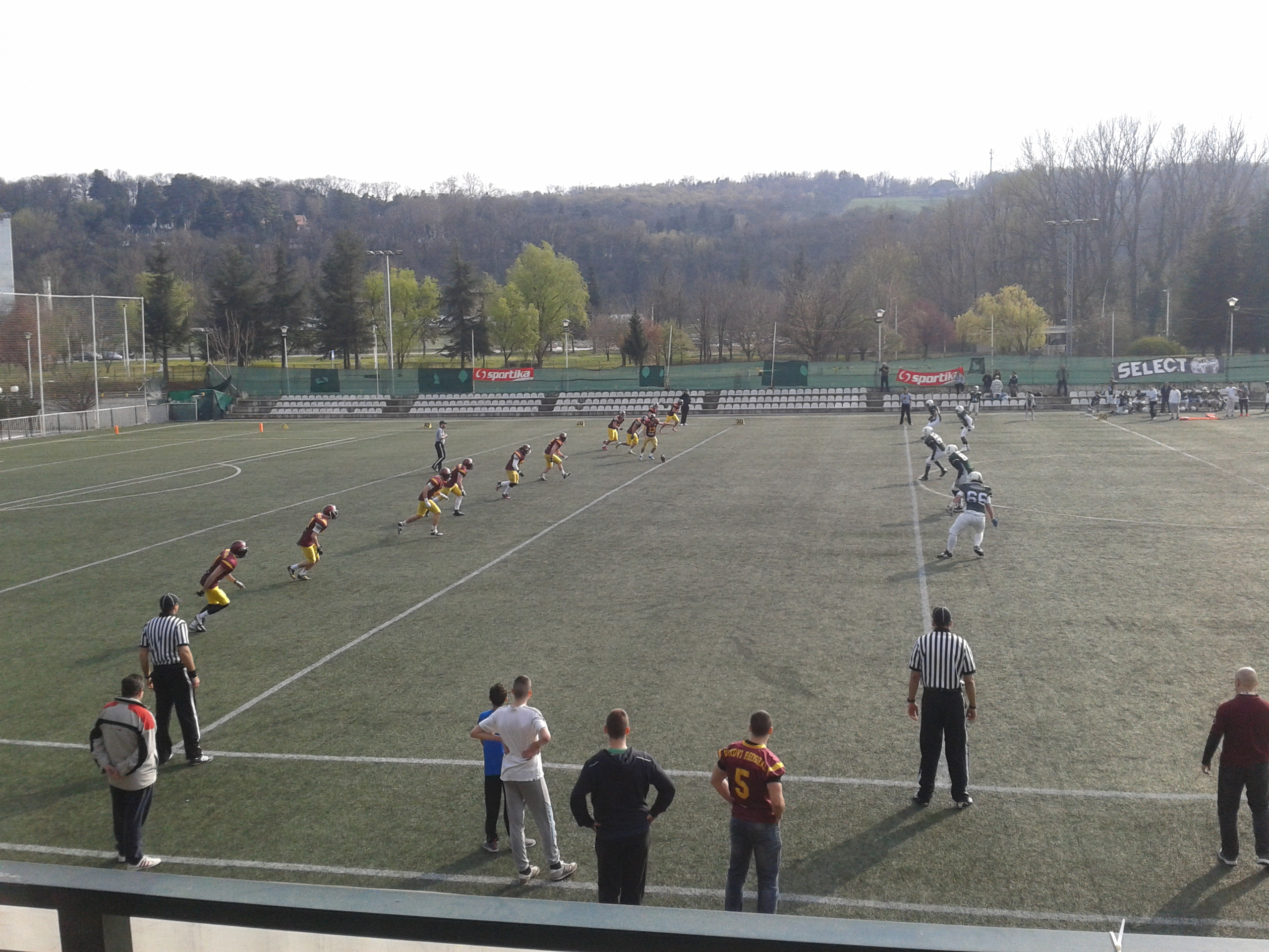 Српски (ћирилица): Вукови - Легионари (ПЛС 2016)